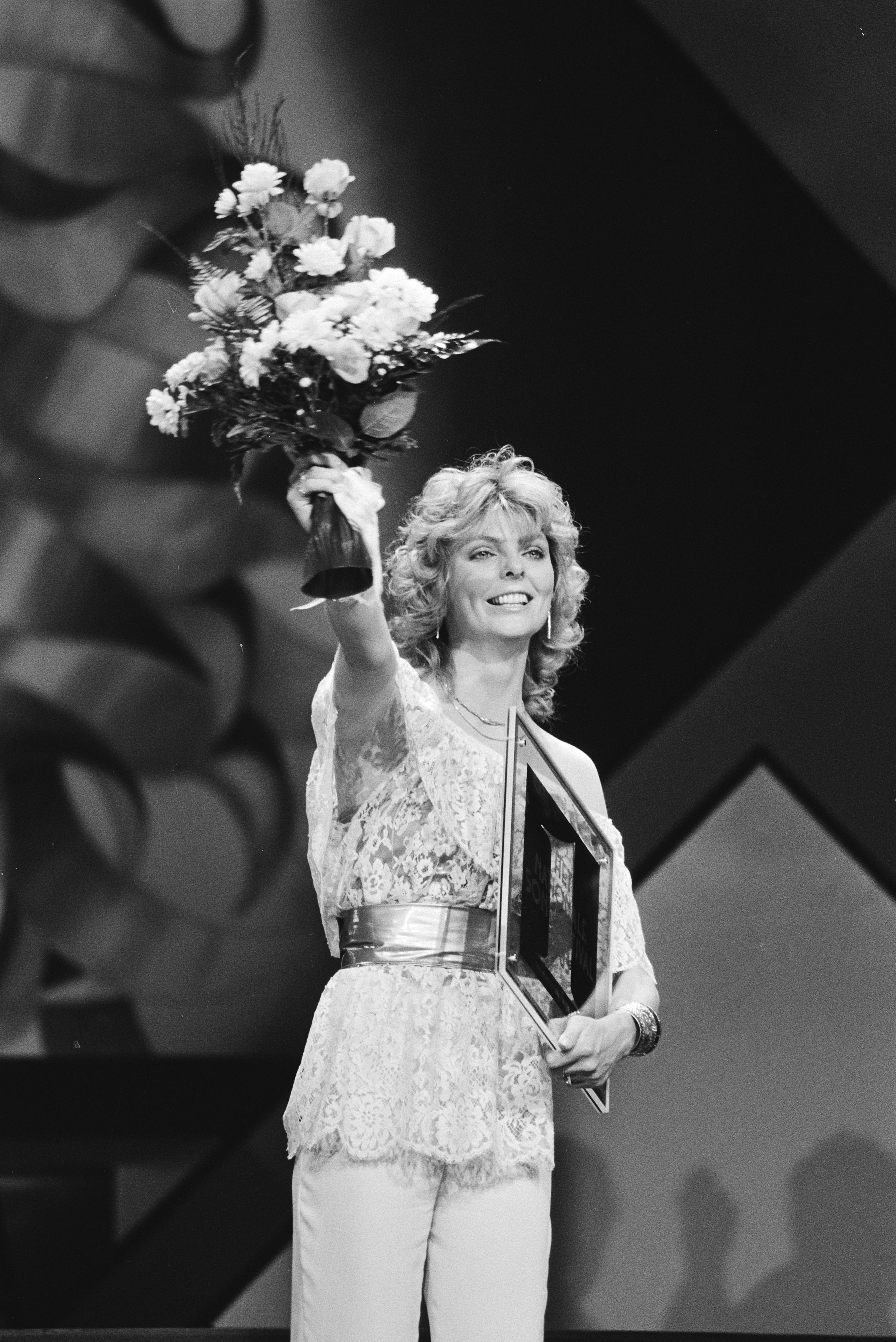 Collectie / Archief : Fotocollectie Anefo Reportage / Serie : Finale van het Nationaal Songfestival 1983 Beschrijving : Winnares Bernadette Datum : 23 februari 1983 Locatie : Den Haag, Zuid-Holland Trefwoorden : muziek, songfestivals, zangers Persoonsnaam : Kraakman, Bernadette Instellingsnaam : Nationaal Songfestival Fotograaf : Antonisse, Marcel / Anefo Auteursrechthebbende : Nationaal Archief Materiaalsoort : Negatief (zwart/wit) Nummer archiefinventaris : bekijk toegang 2.24.01.05 Bestanddeelnummer : 932-5104